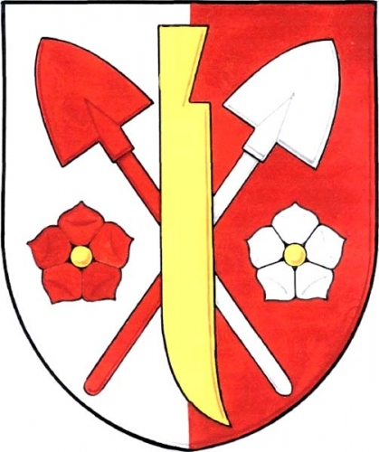 Znak, Dlouhomilov, okres Šumperk